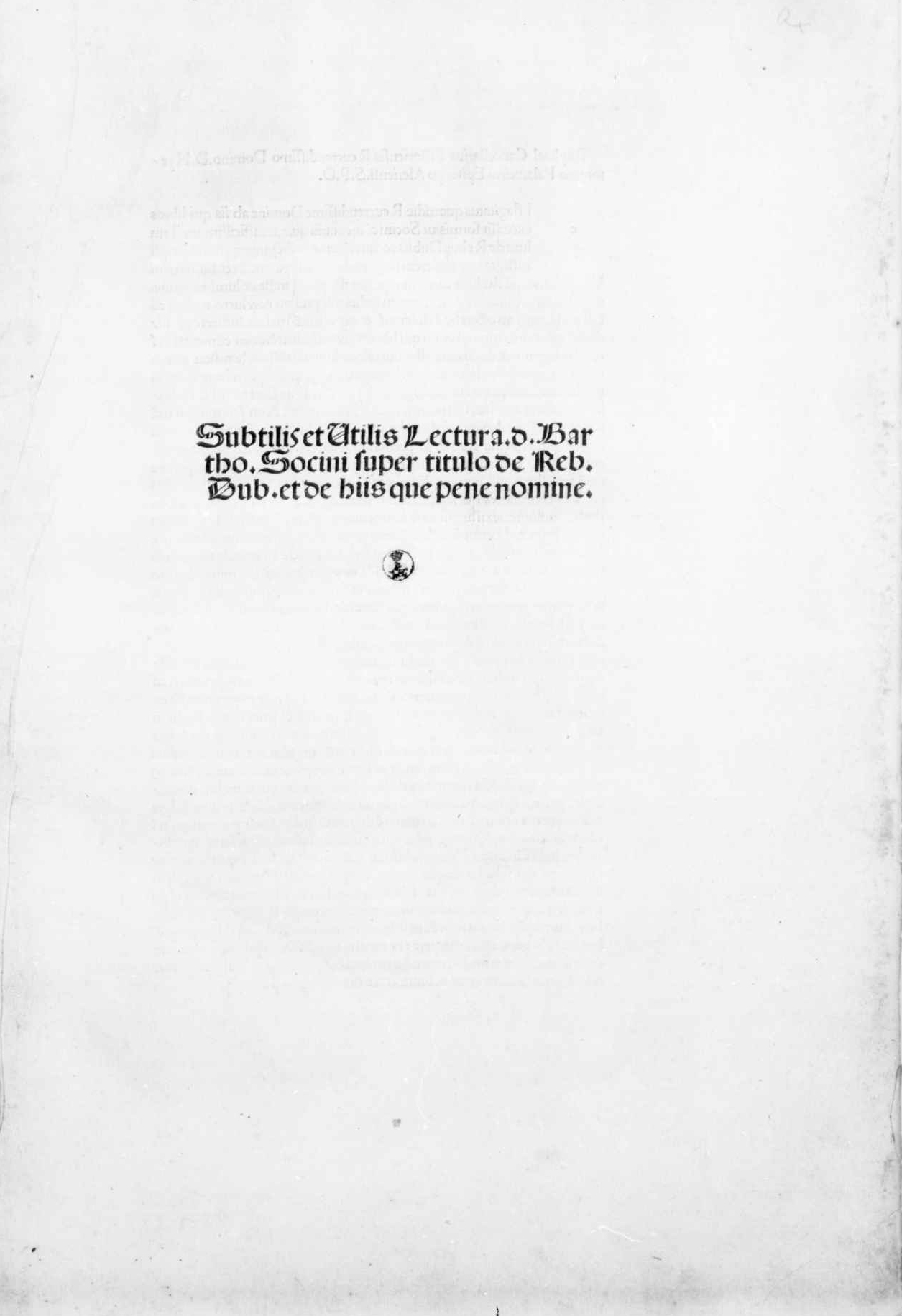 occhietto